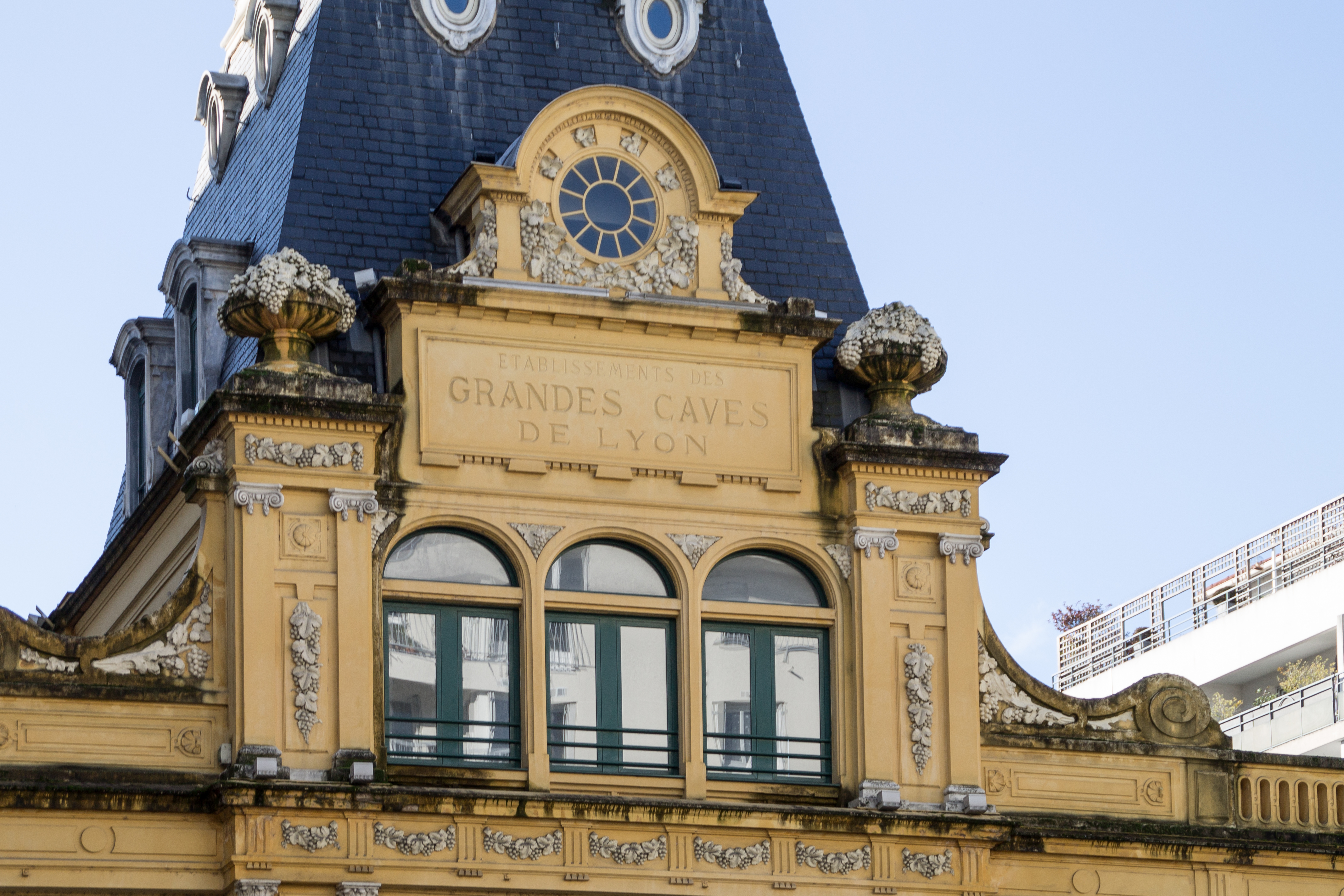 Détail de la façade du bâtiment des Grandes Caves de Lyon dans le quartier Sans Souci